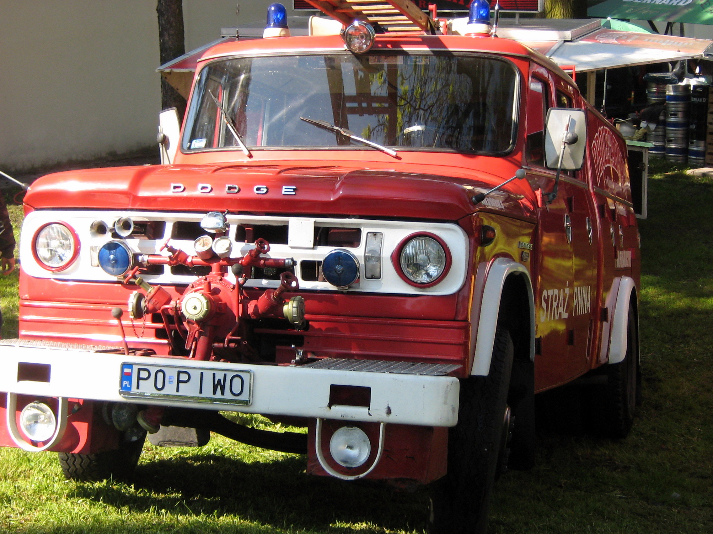 Auto reklamowe na Festiwalu Dobrego Piwa we Wrocławiu 2011